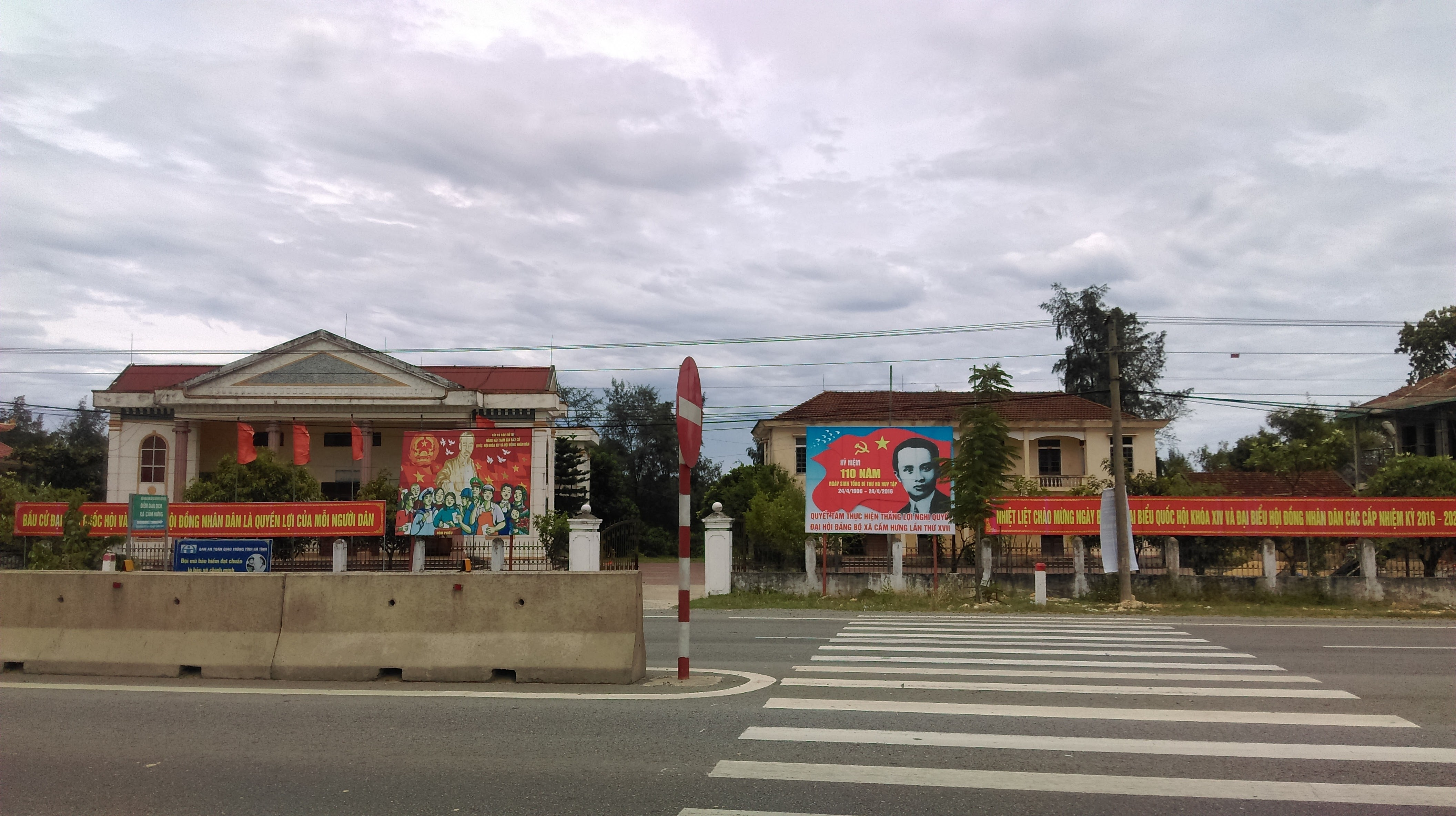 UBND xã Cẩm Hưng, Cẩm Xuyên, Hà Tĩnh